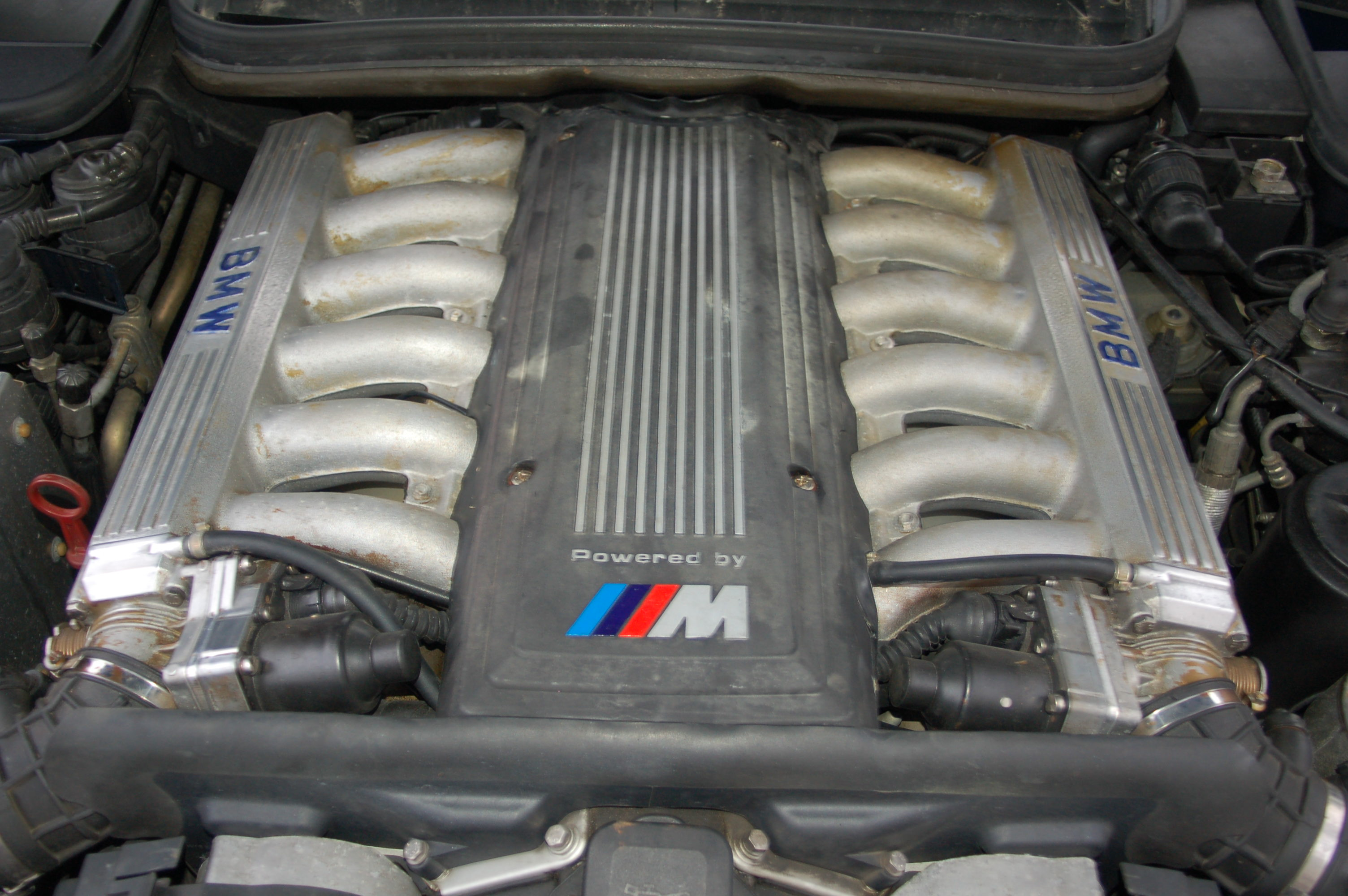 moteur S70B56 d'une BMW 850 serie E31